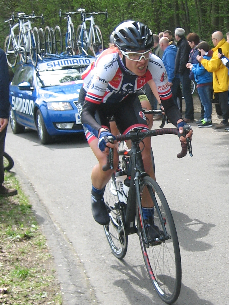 Na 45km, beklimming van de Eyserbosweg, in de Amstel Gold Race Ladies Edition 2017.